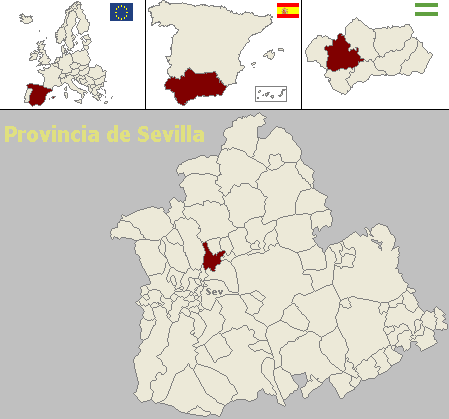 Mapa de localización del municipio sevillano de Alcalá del Río (Andalucía, España)